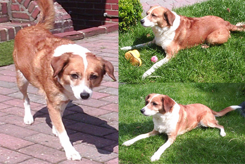 Bastaardhond. Eigen foto, eigen hond.